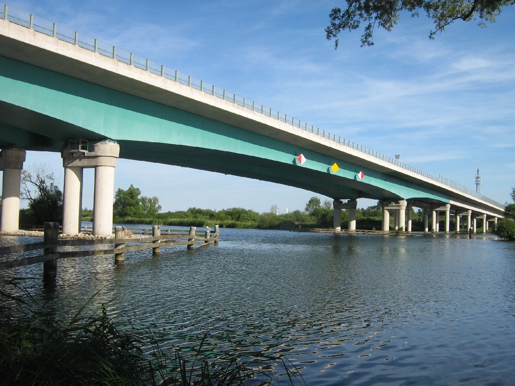 Die 1.100 m lange Brücke der Bundesautobahn A20 über dem Tal der Peene bei Jarmen, Landkreis Demmin, (Mecklenburg-Vorpommern, Germany)